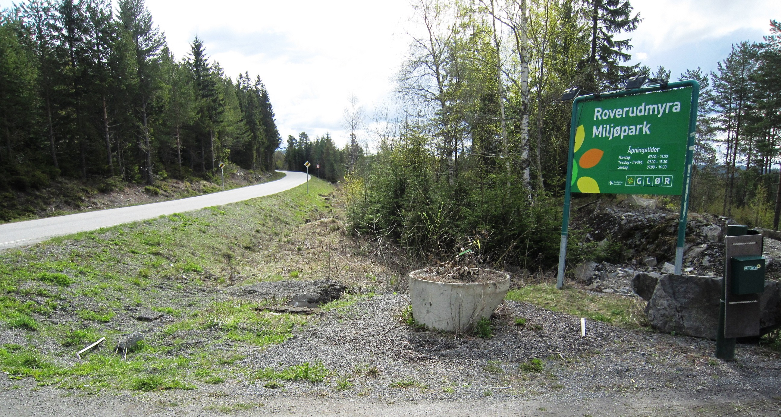 FV2536 (tidl. FV320) går forbi Roverudmyra Miljøpark.